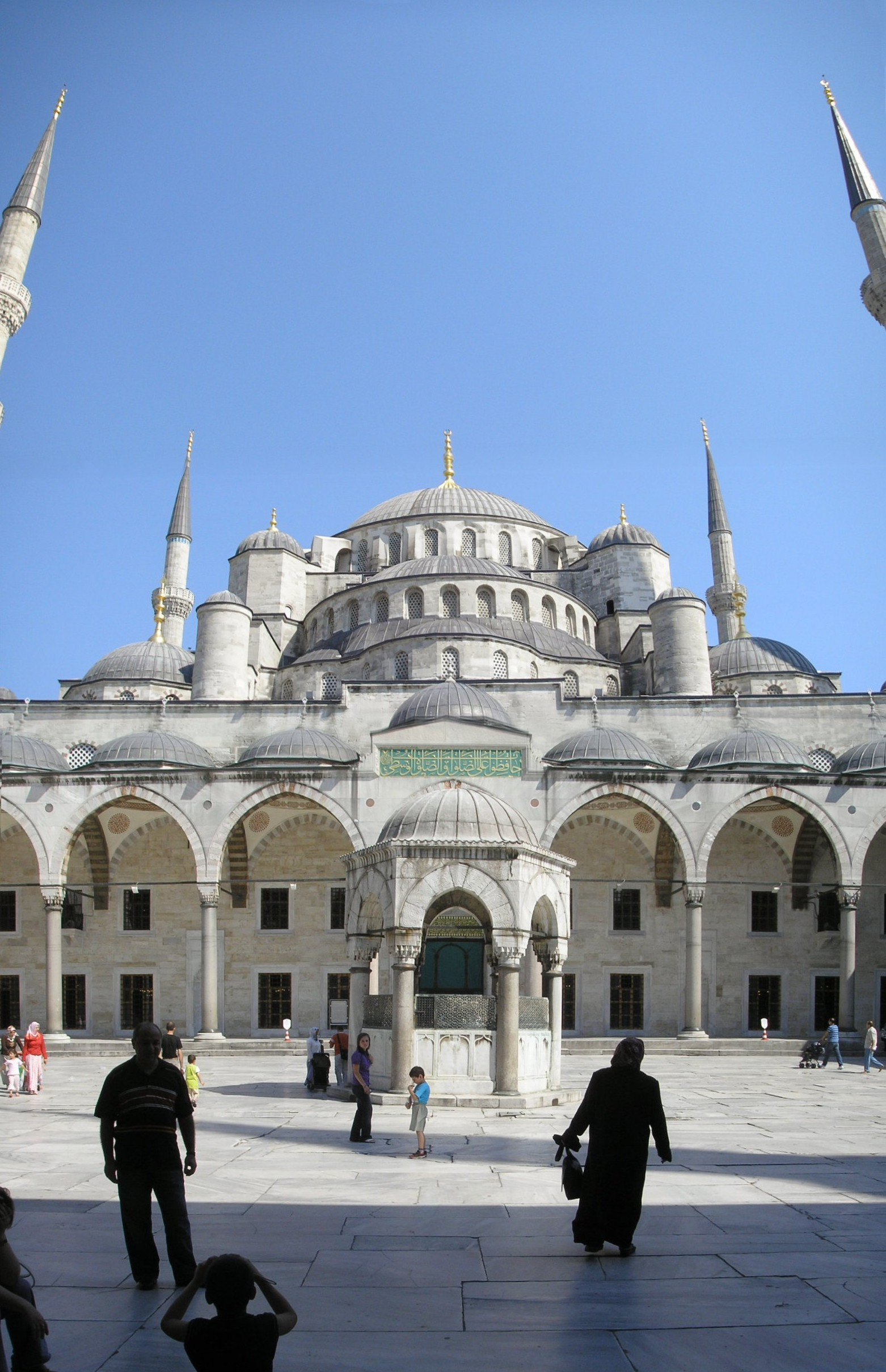 Blue mosque in Istanbul.